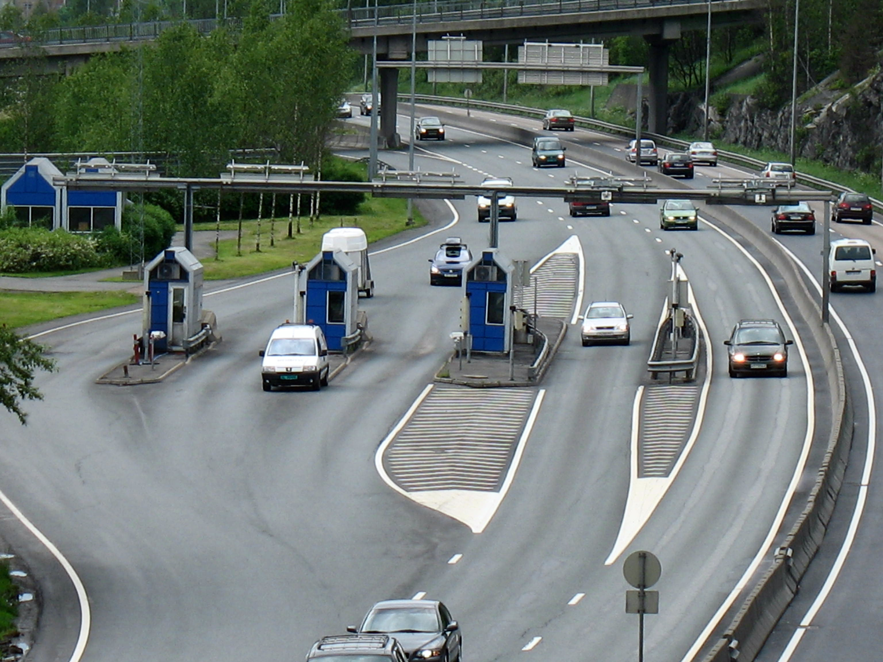 En bomstasjon i Oslo, langs E6 der veien danner skillet mellom Lambertseter og Abildsø